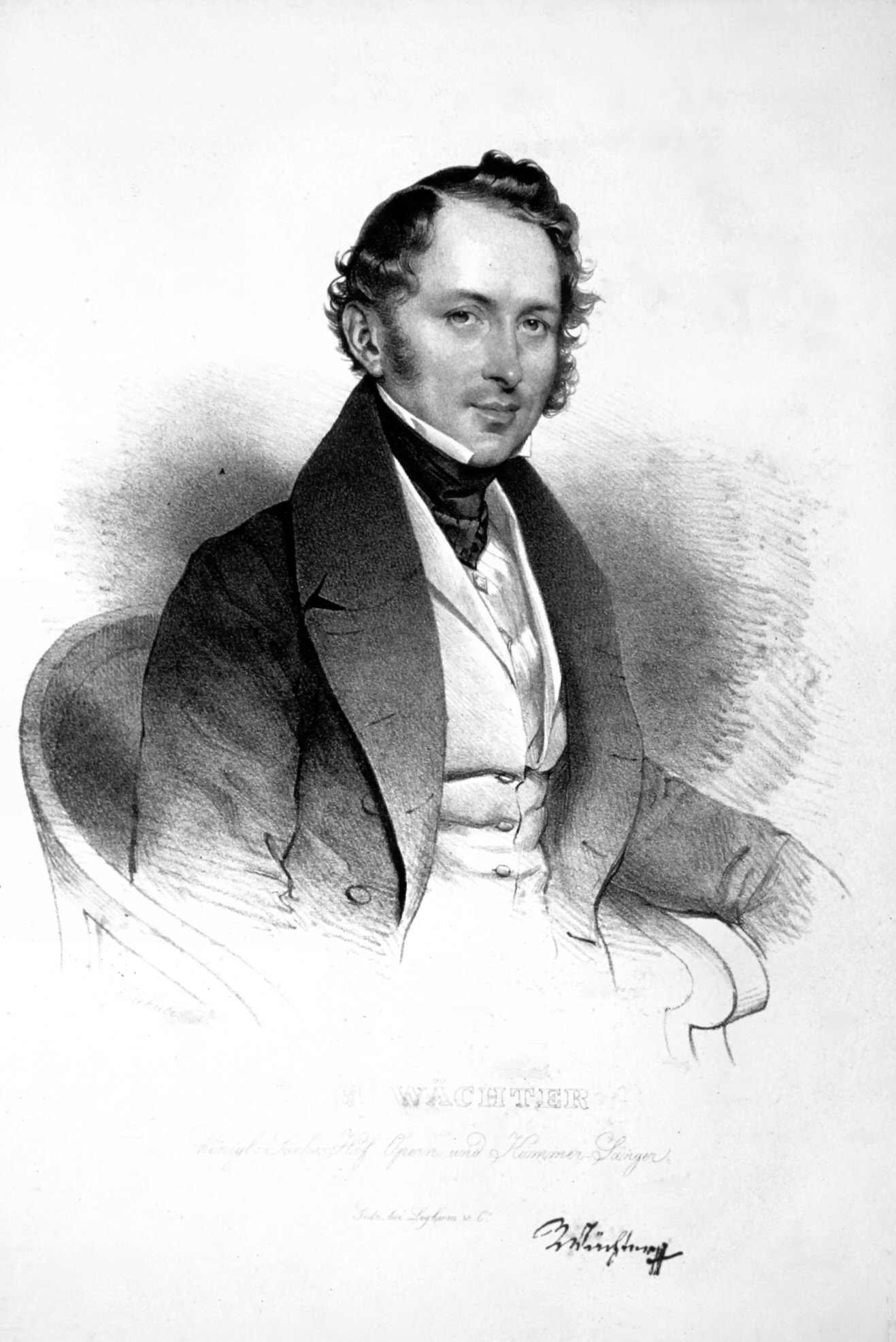 Portrait of Johann Michael Wächter (1794-1853), Austrian vocalist (Bass-Bariton).